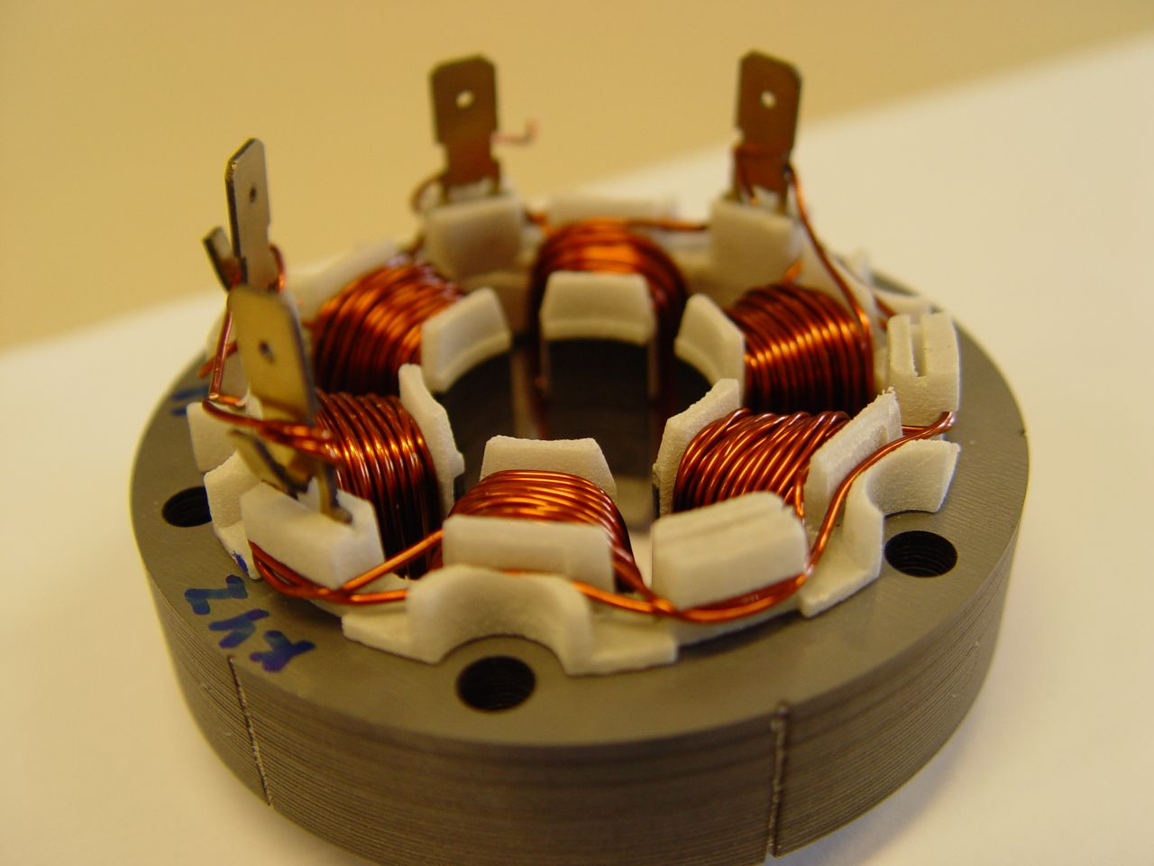 Stator 1